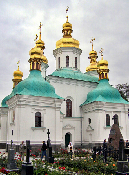 Церковь Рождества Пресвятой Богородицы (Киево-Печерская лавра)